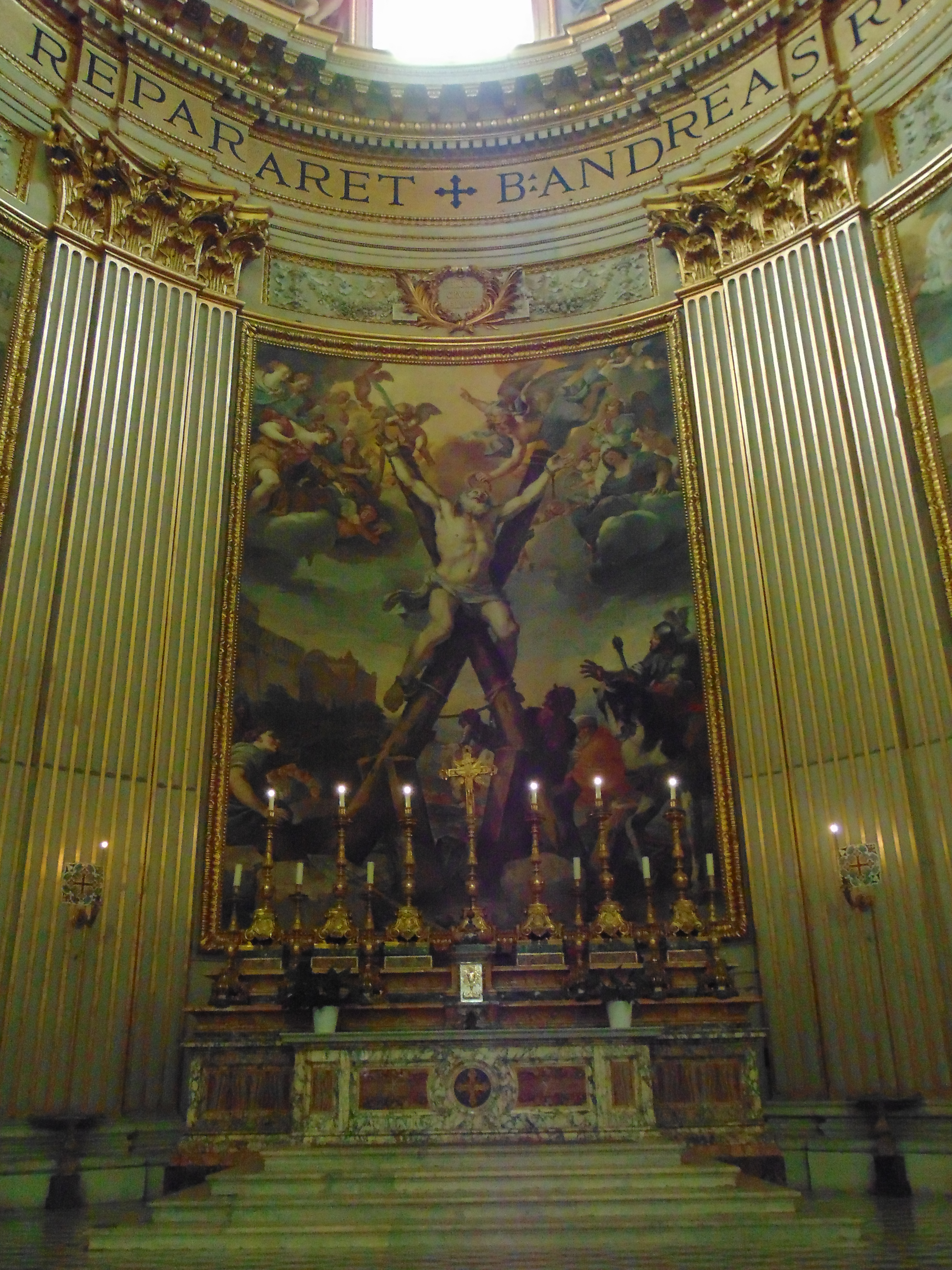 Basilica di Sant'Andrea della Valle